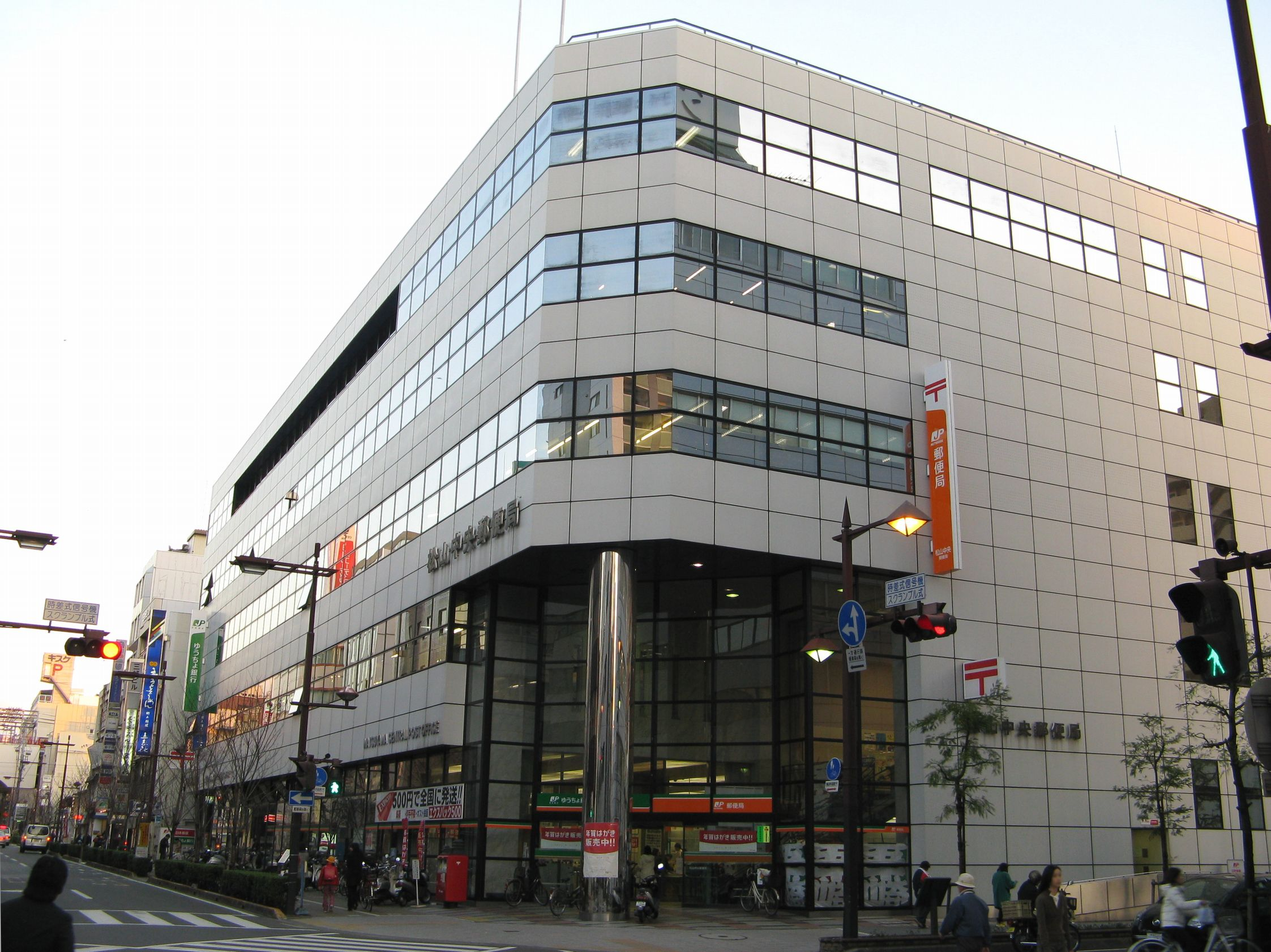 松山中央郵便局